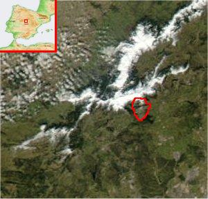 Localización de La Pedriza (Comunidad de Madrid, España).